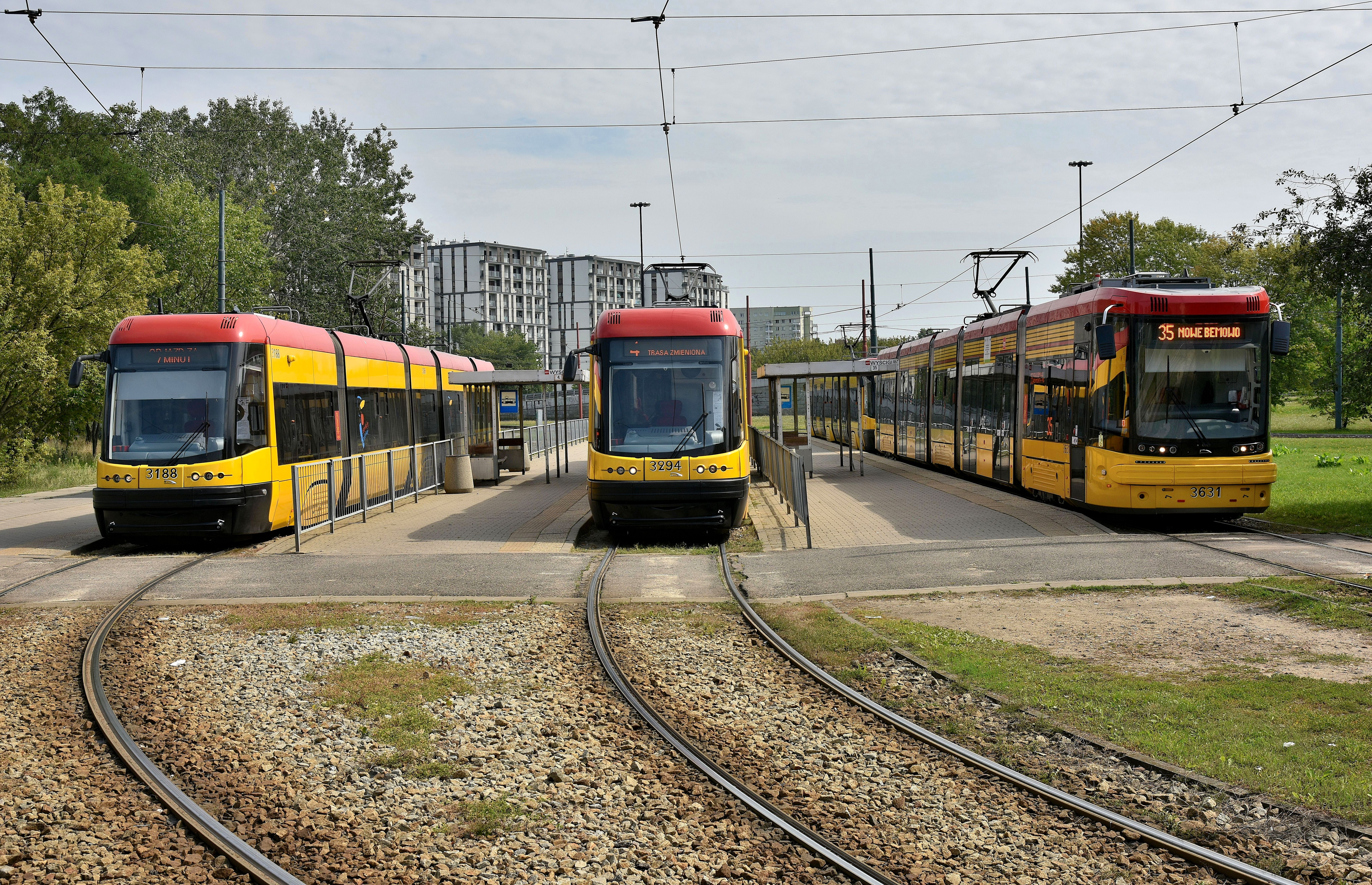 Pętla tramwajowa Wyścigi w Warszawie